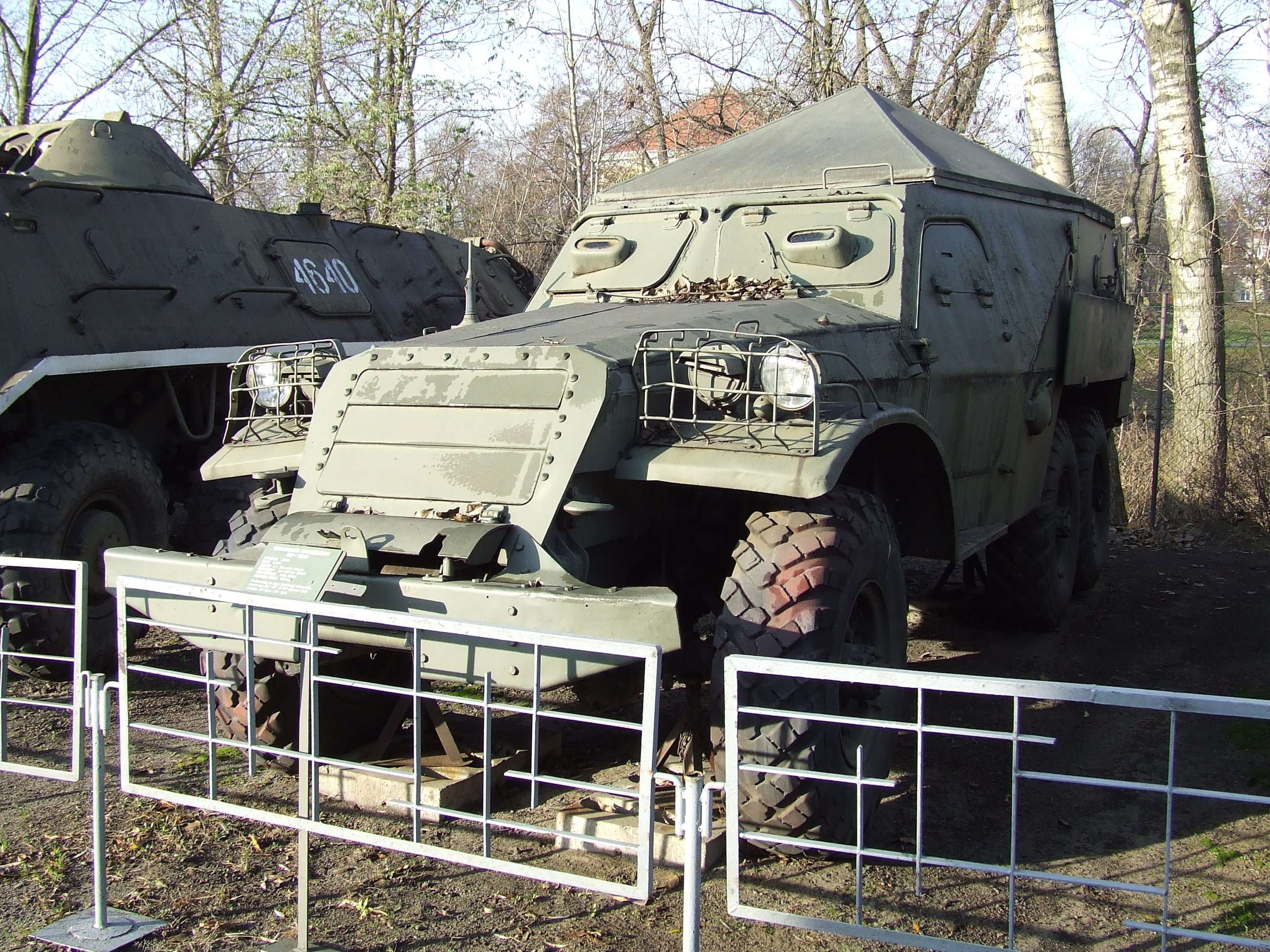 BTR-152W, Muzeum Wojska Polskiego, Warszawa-Czerniaków